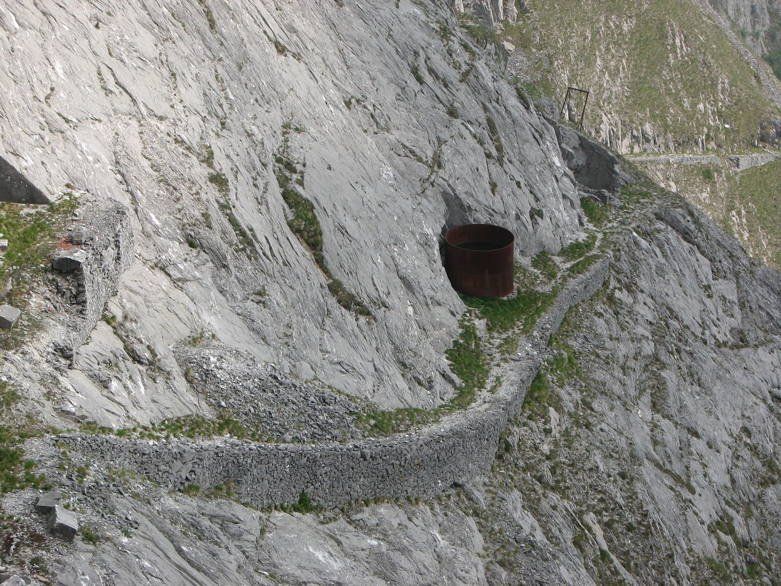 Il tratto finale della lizza delle Gruzze (Cruze) presso la Focetta dell'Acqua Fredda - Toscana, Italia.